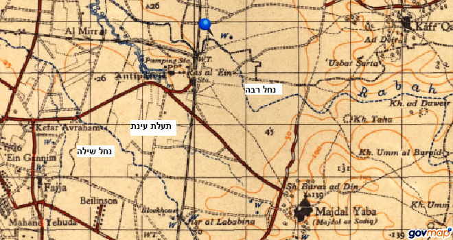 מפת תעלת עינת 1940